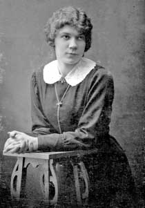 Фотография Ирмы Петровны Яунзем, ученицы Минской Мариинской гимназии. 1914 год.